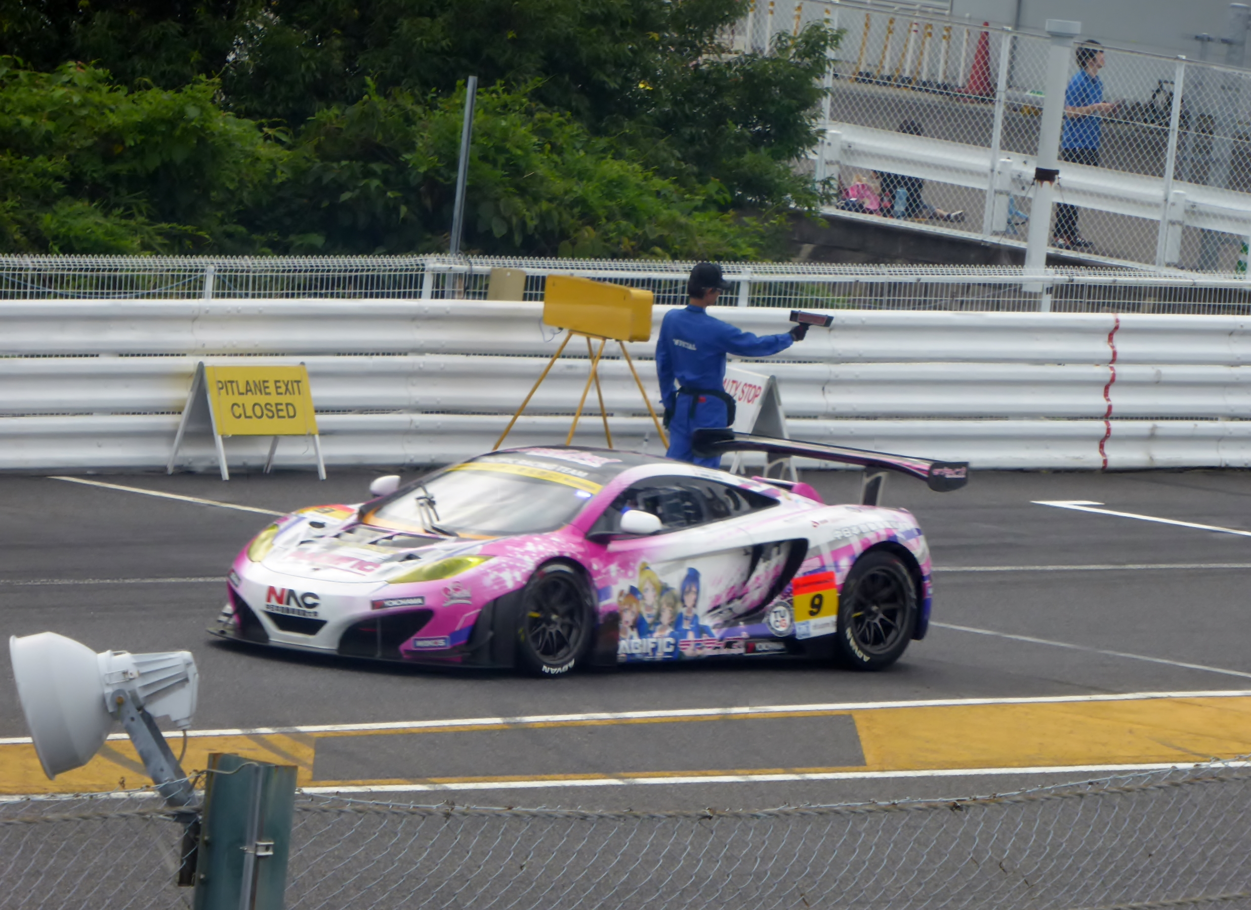 2015年鈴鹿1000㎞において9号車PACIFIC McLaren with μ'sを撮影。